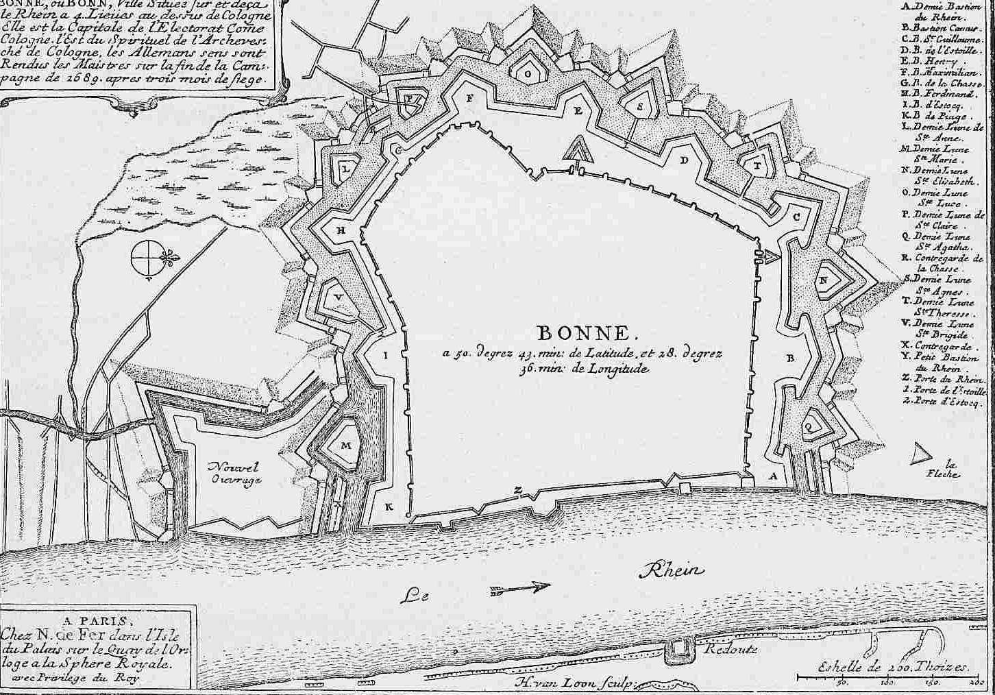 Grundriss der Bonner Stadtbefestigung aus dem Jahr 1689